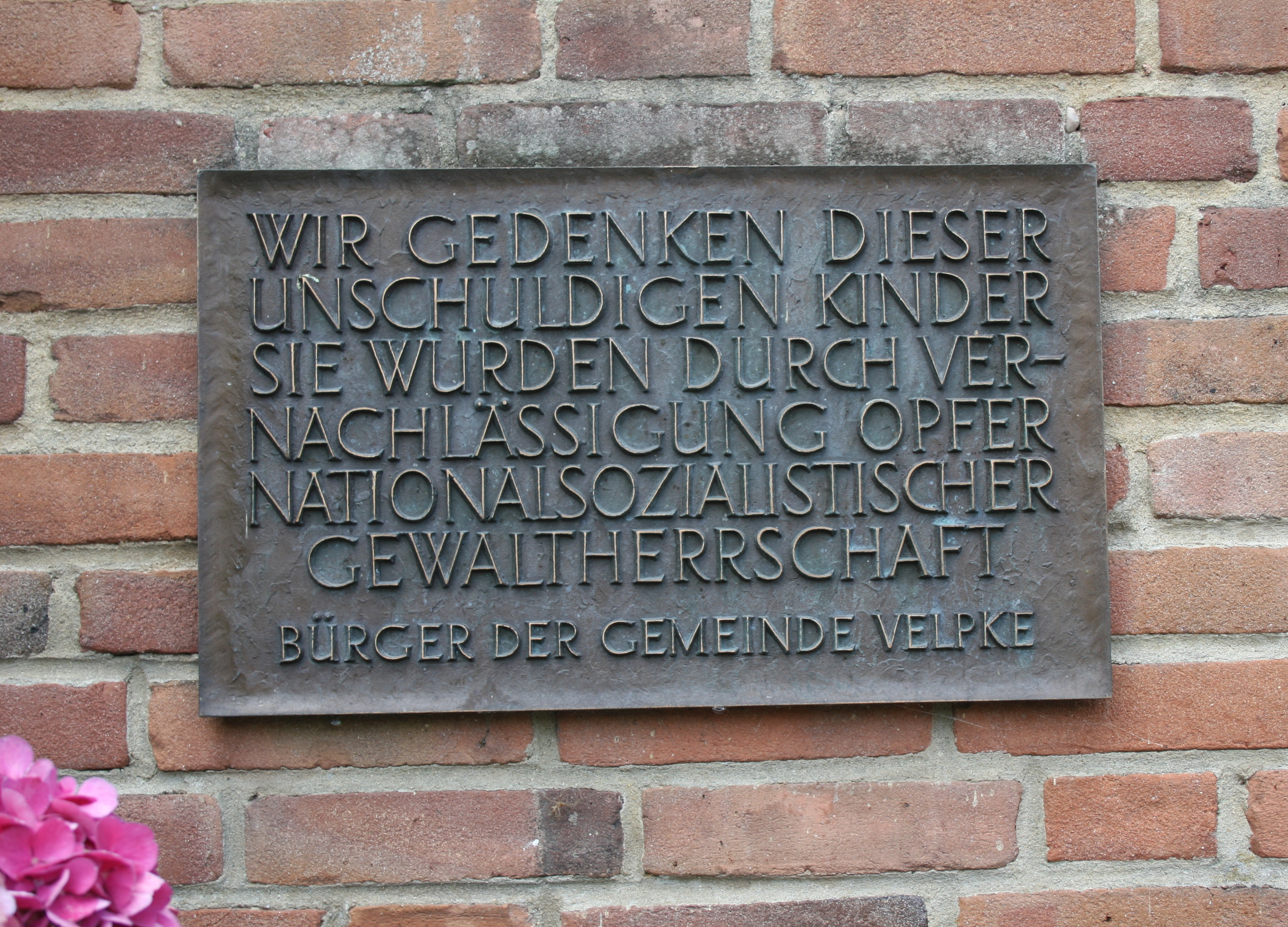 Mahnmal mit Bronzetafel der Bürger von Velpke